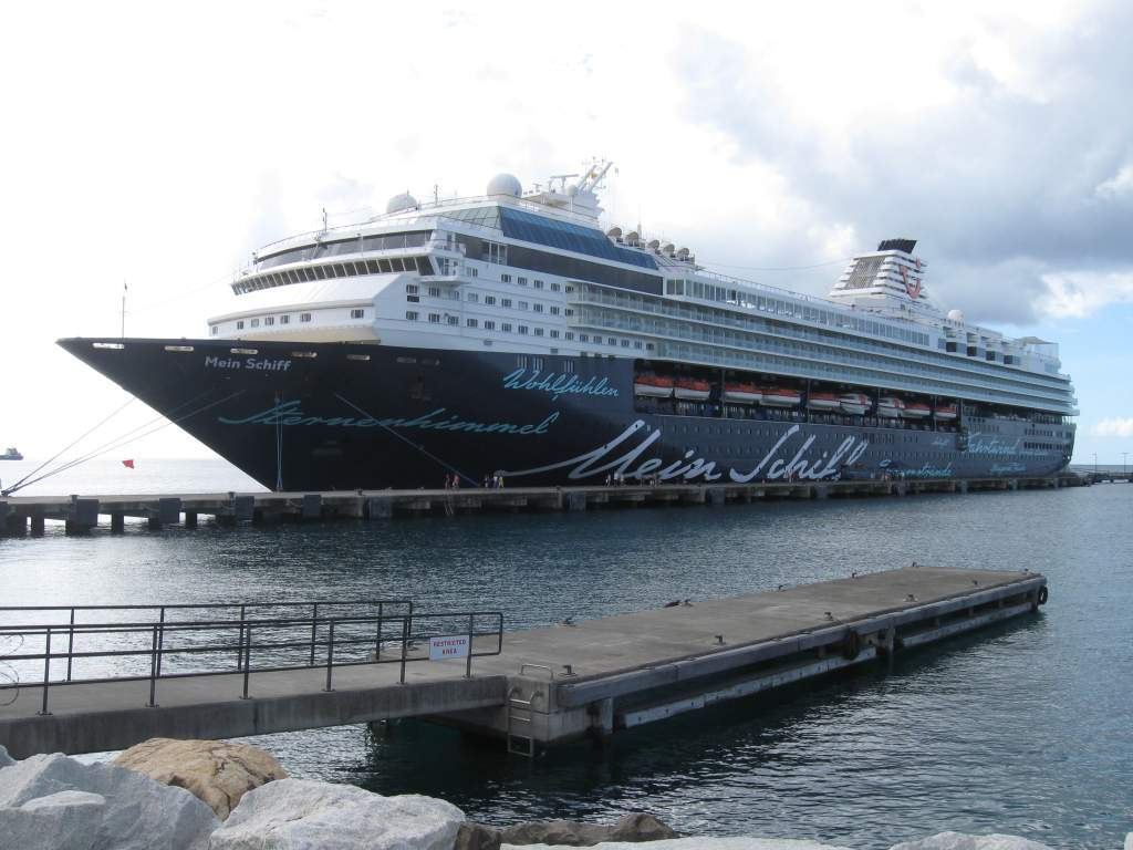 Mein Schiff am 29. November 2009 in St. Georges - Grenada - Karibik am Cruise Terminal vor der Stadt